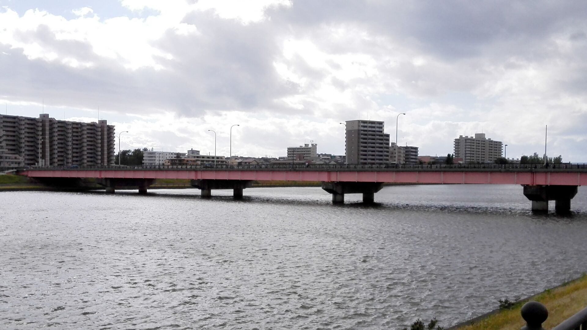 上流側から撮影